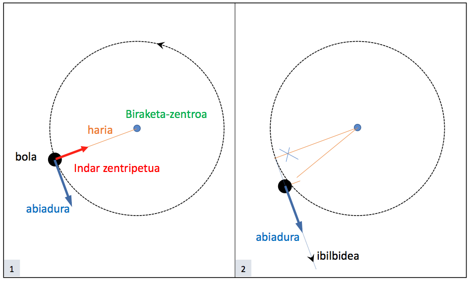 Bi irudiz osatutako eskema. Lehengoan, hari baten muturretik lotuta dagoen objektu baten higidura zirkularrari dagozkion ibilbidea eta indar zentripetua adierazten dira. Bigarrenean